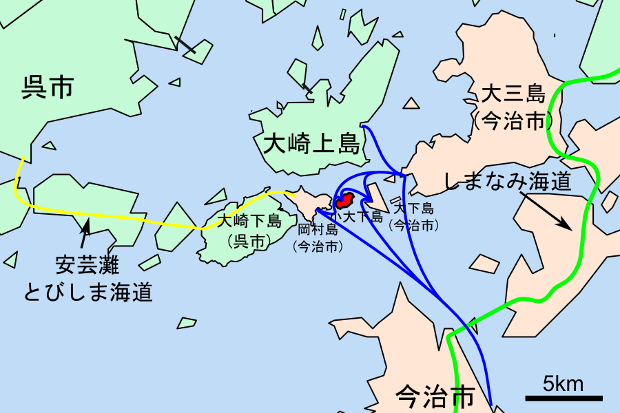 小大下島の位置図